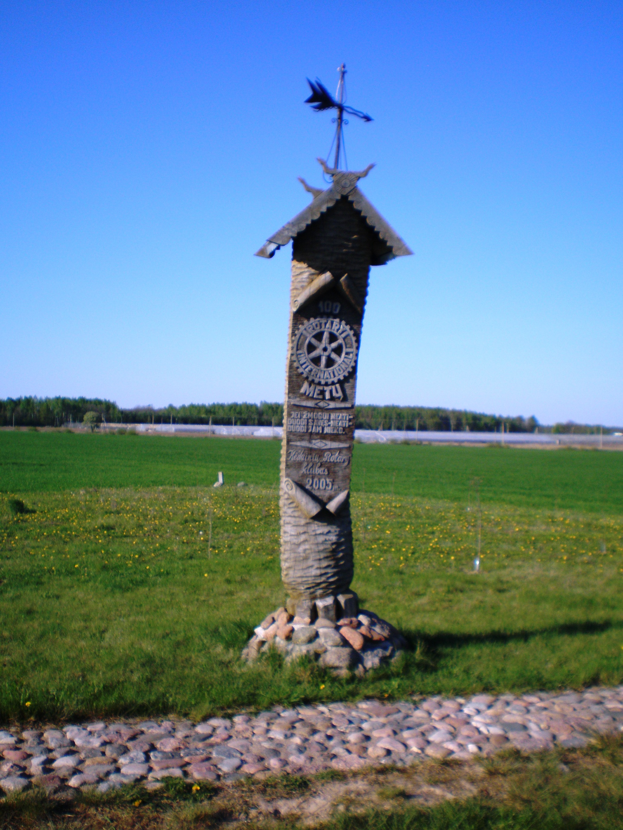 Lietuvos centras, Ruoščiai, Kėdainių raj.